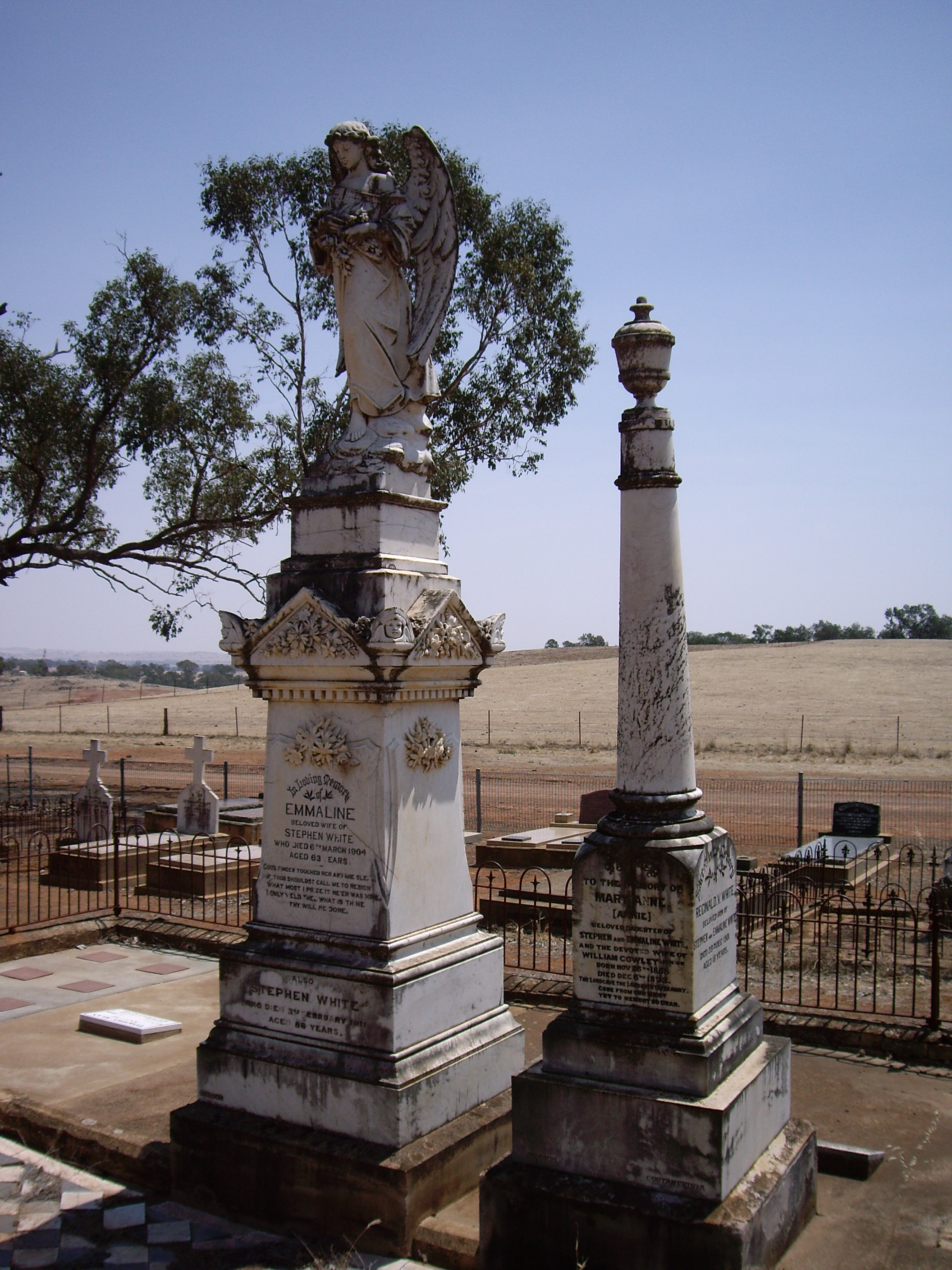 Mitta Mitta Cemetery